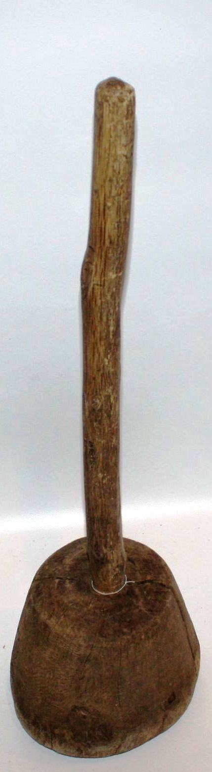 Kapsanui, Materjal tamm Mõõdud läbimõõt: 225.0 mm (nuia); pikkus: 775.0 mm (üld); pikkus: 200.0 mm; umbes.1910 - 1920 valmistamine Eesti Upa; talu Laasi valmistaja: Mets, Mihkel (1881-1947)